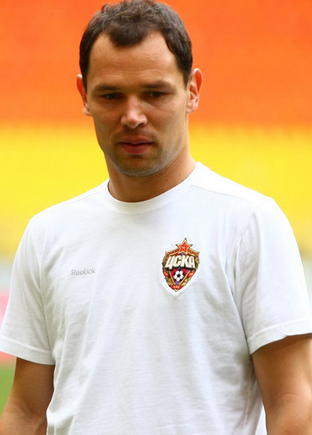 Сергей Игнашевич.